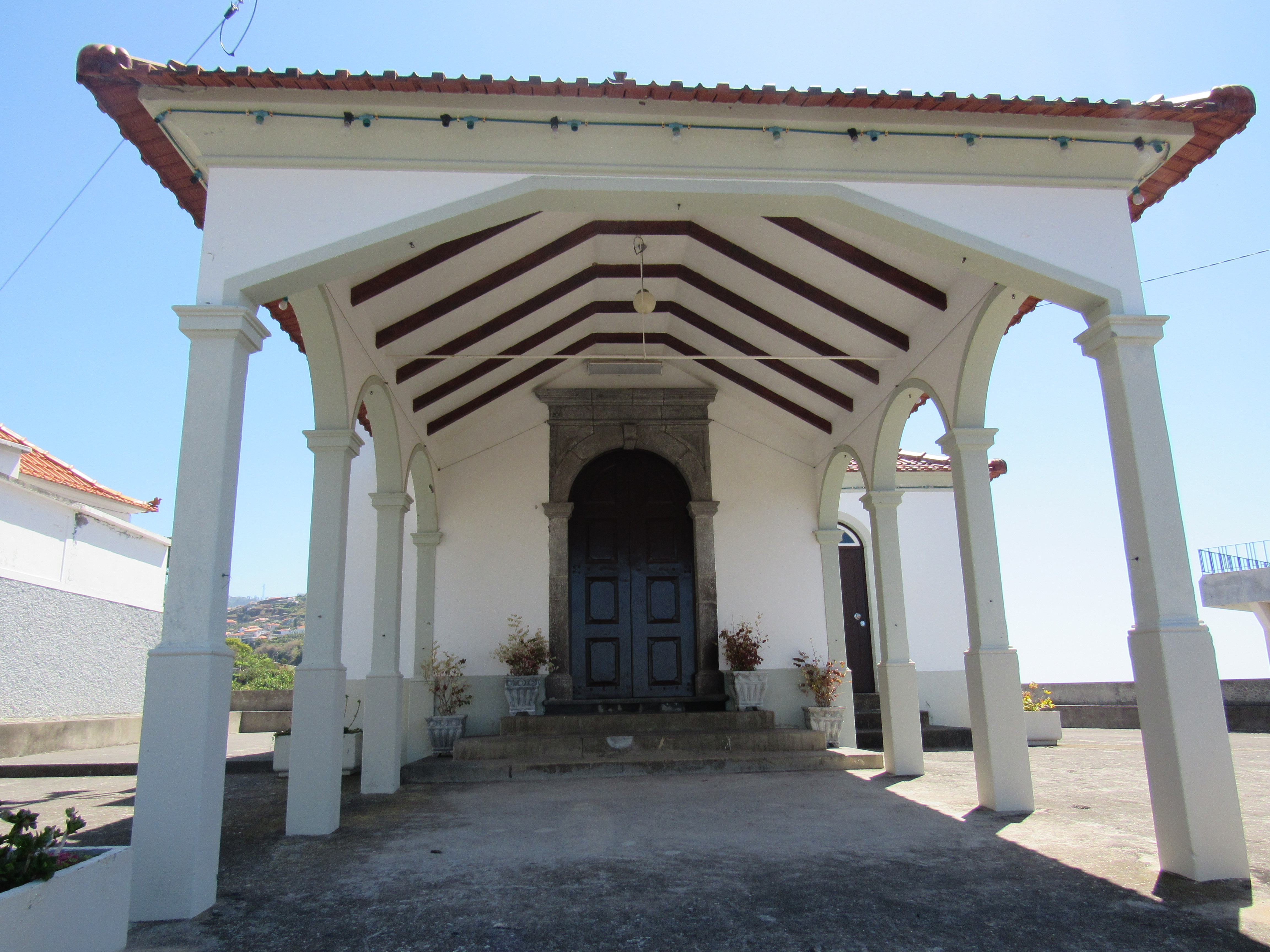 Capela de Nossa Senhora do Livramento situa-se no sítio do Livramento - Ponta do Sol